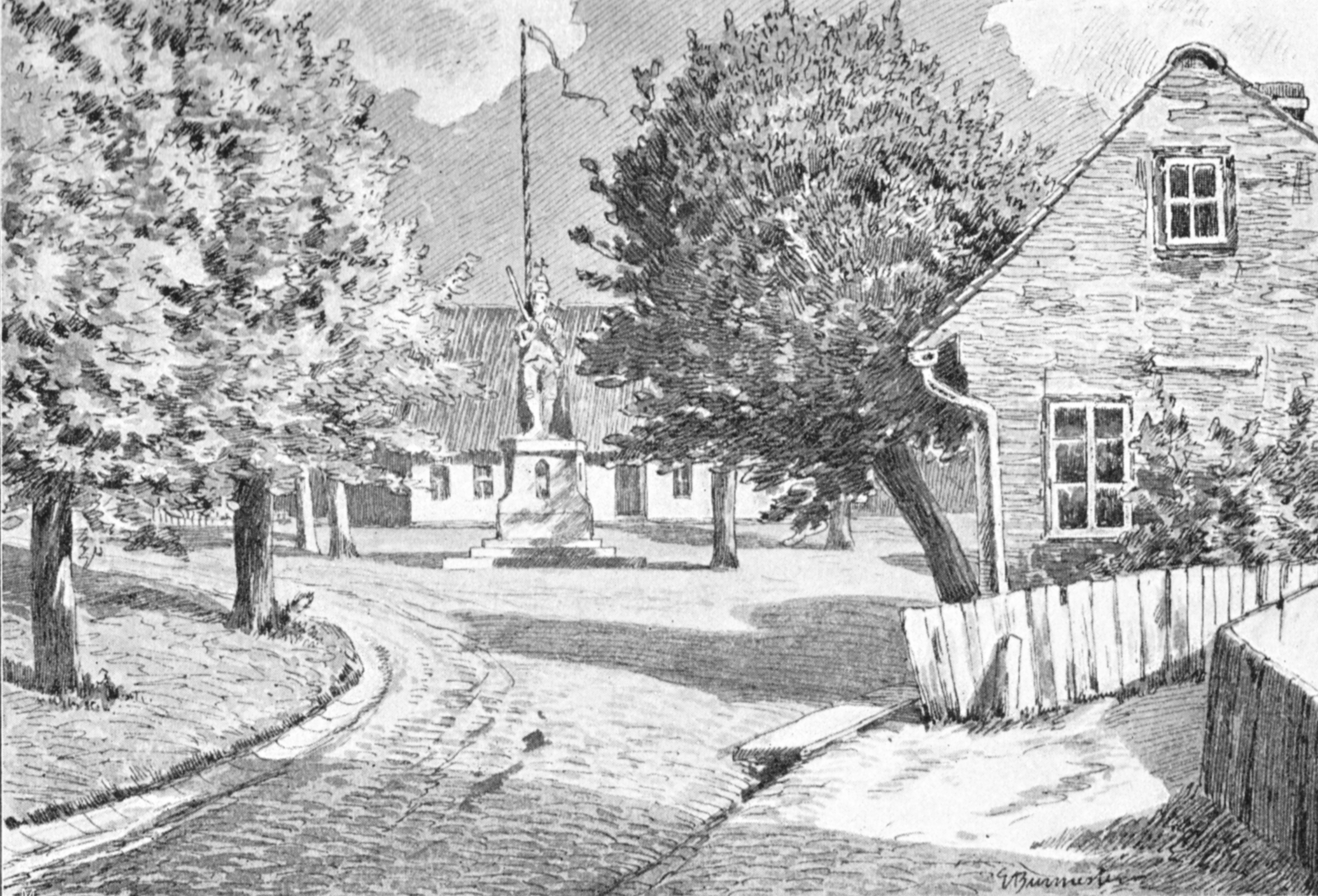 Marktplatz von Wedel mit der Rolandstature, Zeichnung von Georg Burmester um 1895